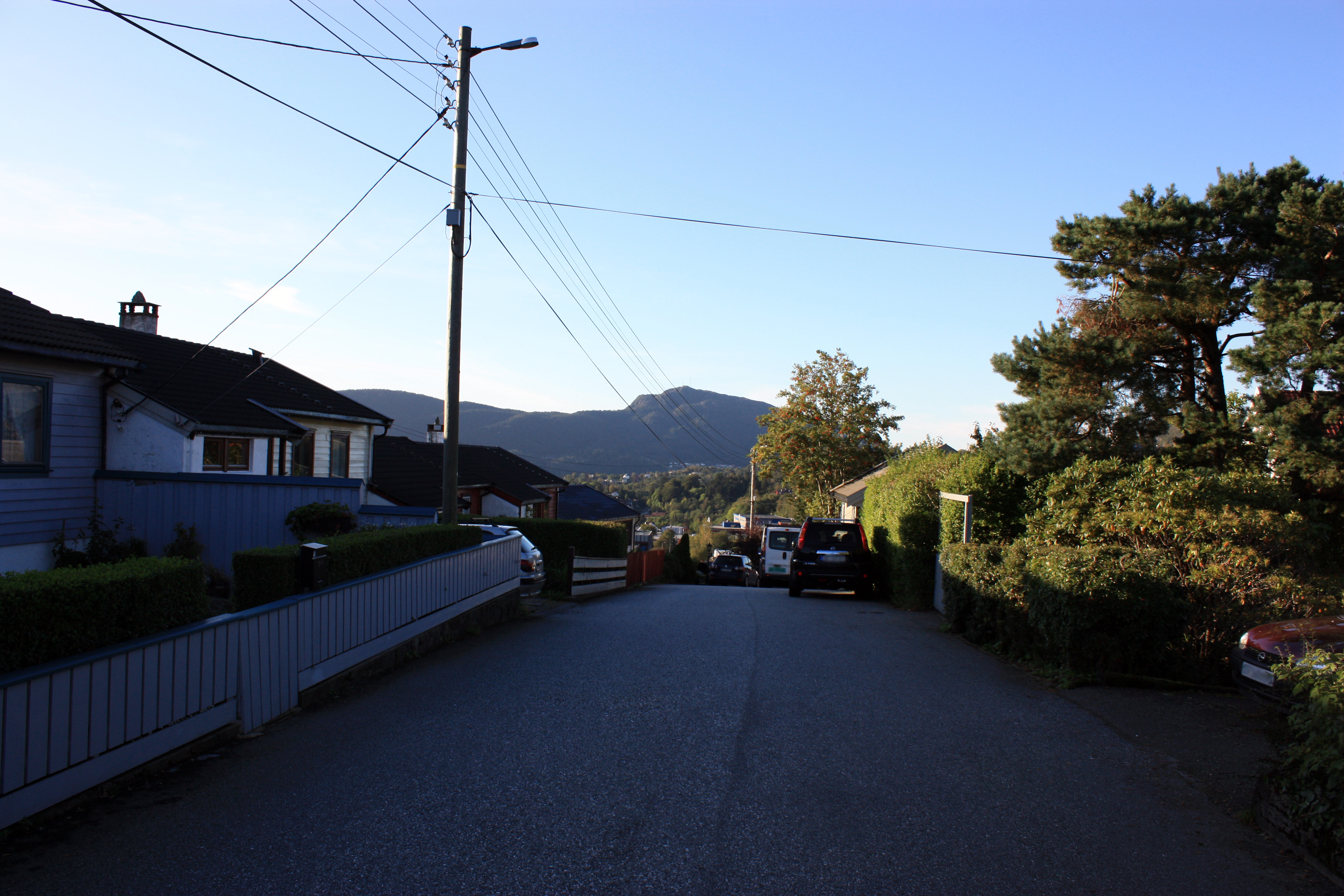 Solåsen, Fana, Bergen.